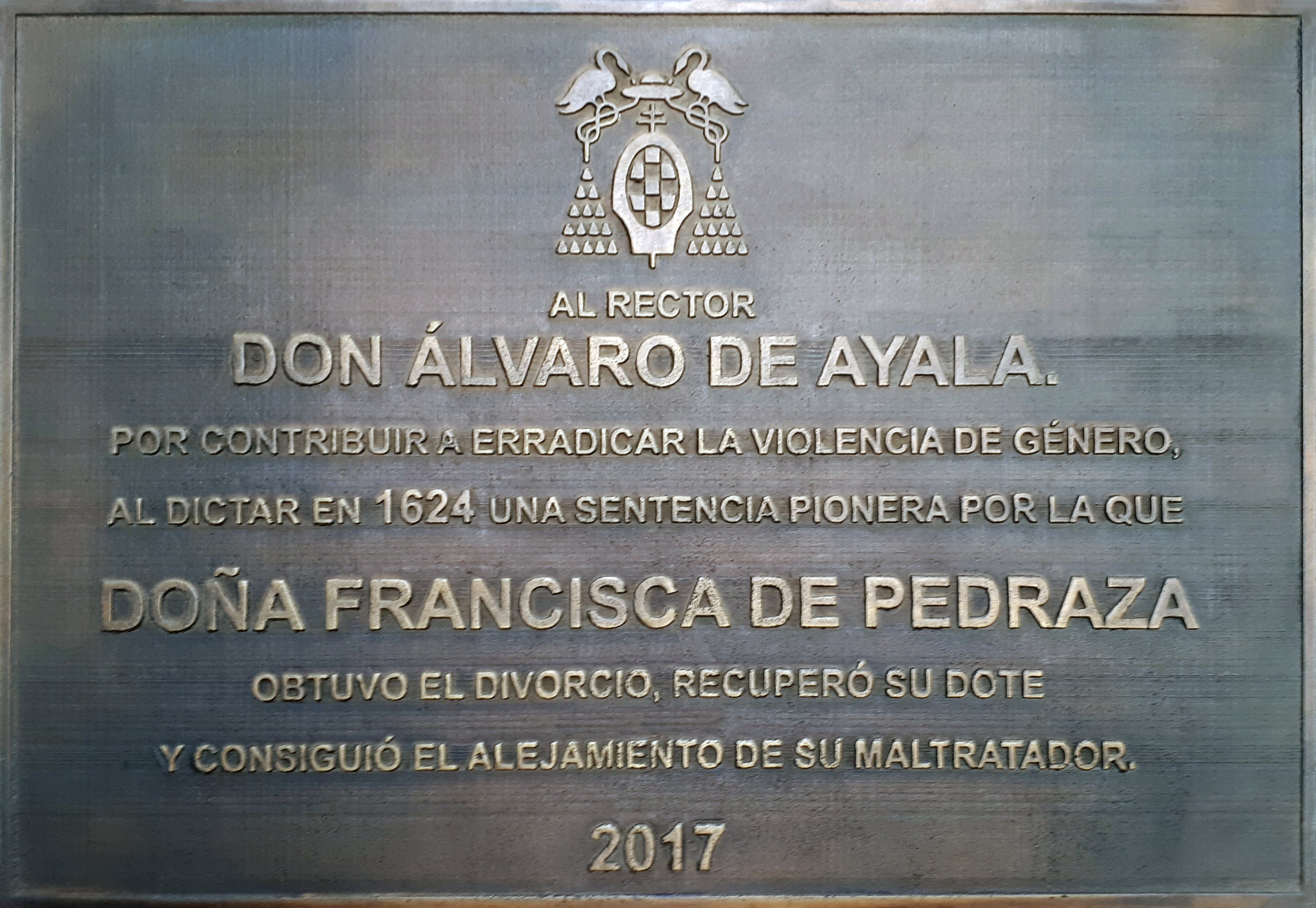 Placa de bronce de la Universidad de Alcalá dedicada "Al rector Don Álvaro de Ayala por contribuir a erradicar la violencia de género, al dictar en 1624 una sentencia pionera por la que Doña Francisca de Pedraza obtuvo el divorcio, recuperó su dote y consiguió el alejamiento de su maltratador. 2017" situada en el patio de Tomás de Villanueva del Colegio Mayor de San Ildefonso en Alcalá de Henares (Comunidad de Madrid - España.